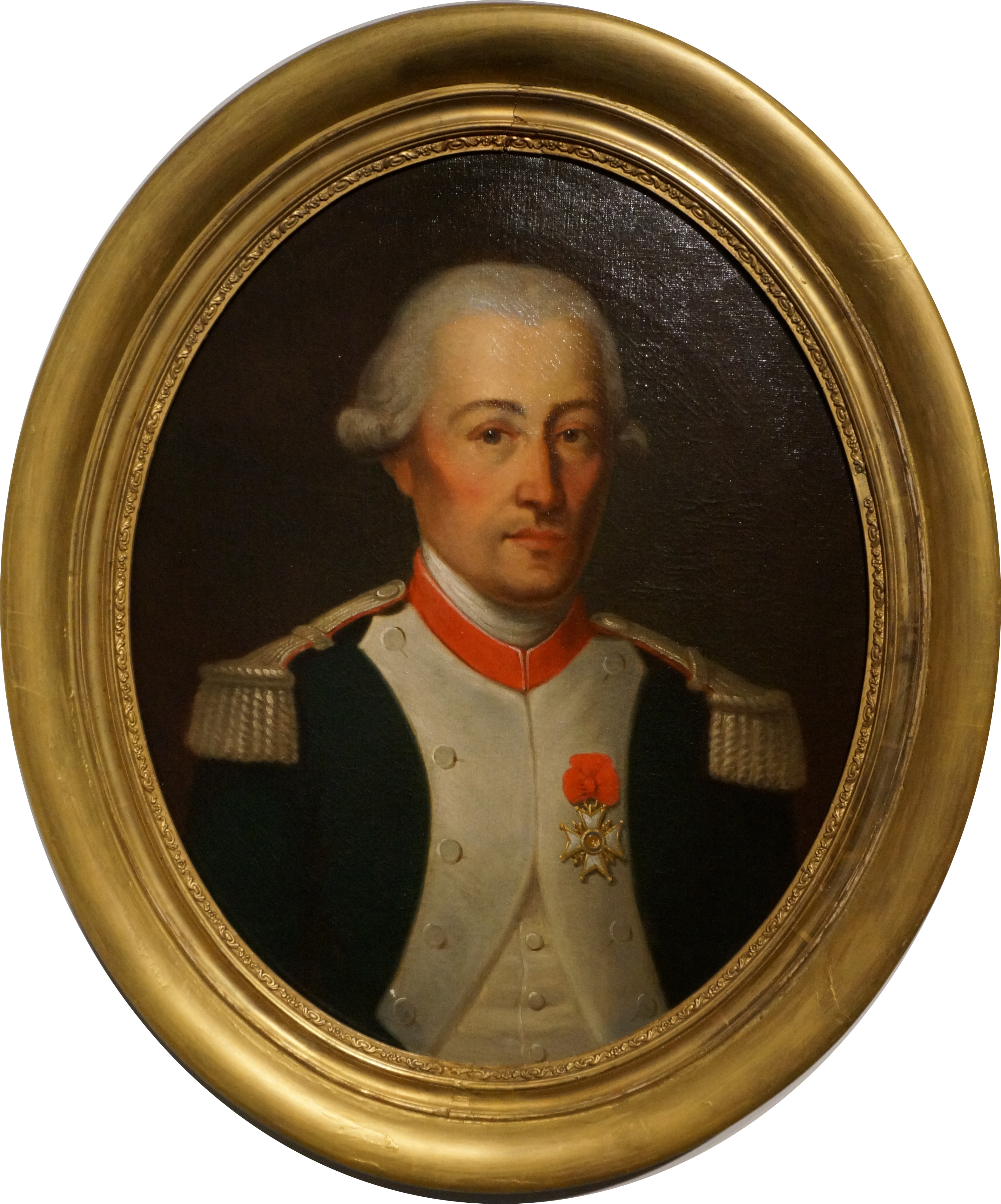 Présenté au Musée de l'armée comme leiutenant-colonel au 10e régiment de dragons.